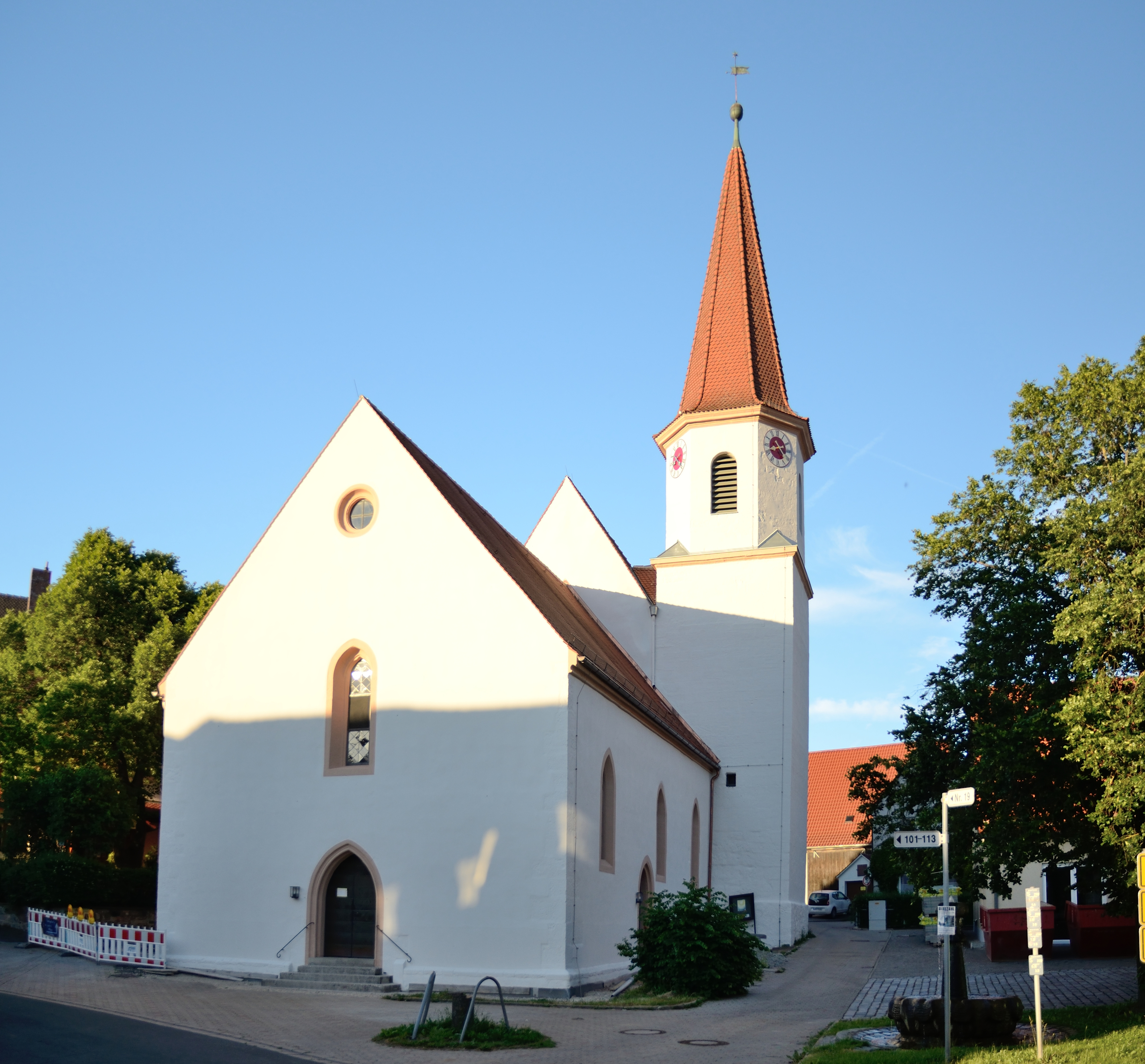 St. Bartholomäuskirche in Brodswinden